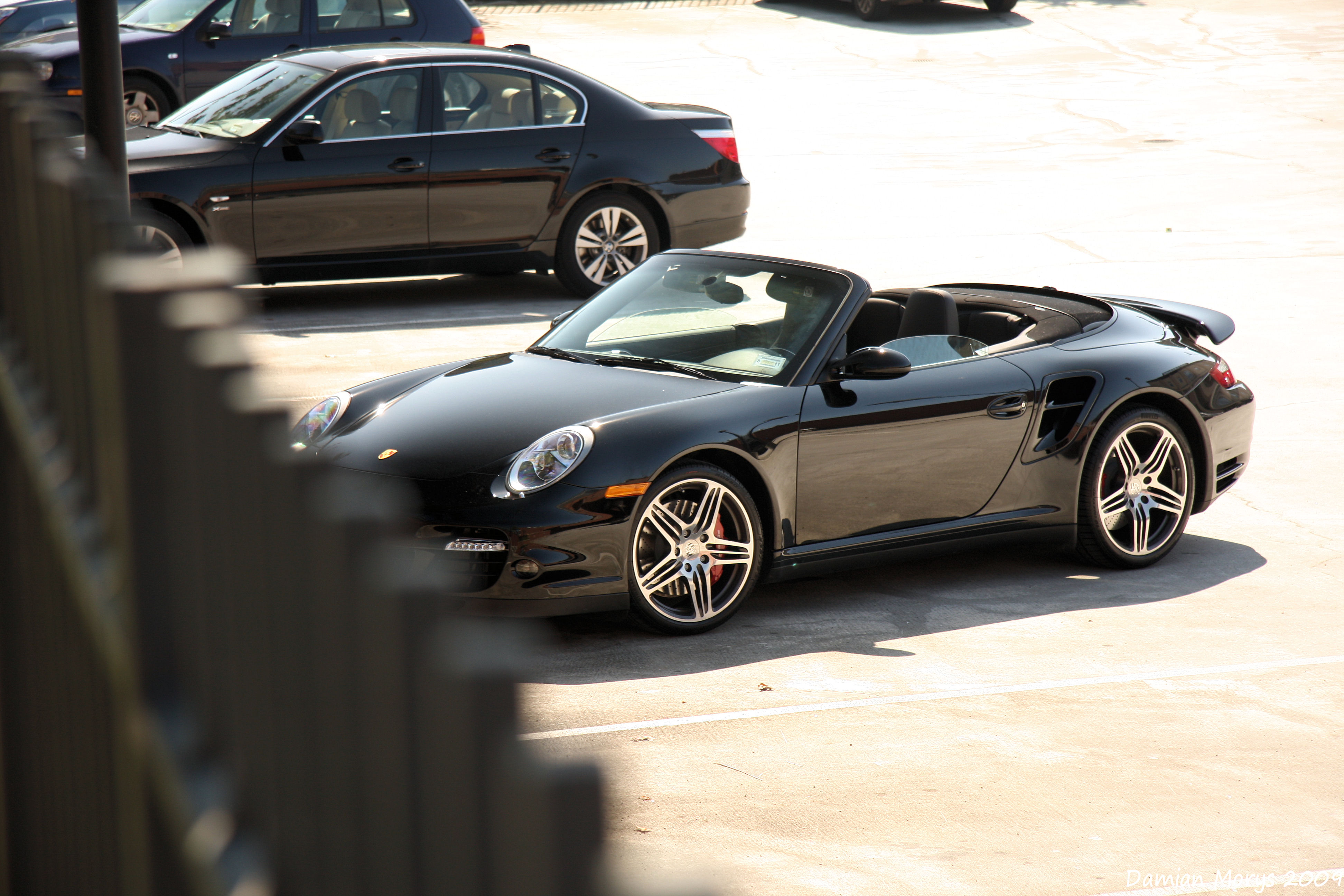 Porsche 911 (997) Turbo Cabriolet